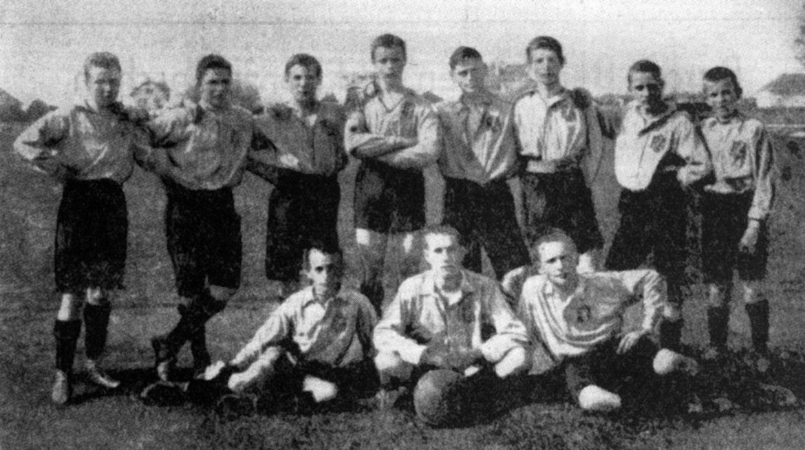 Mannschaftsfoto des FC Allemania (1907)